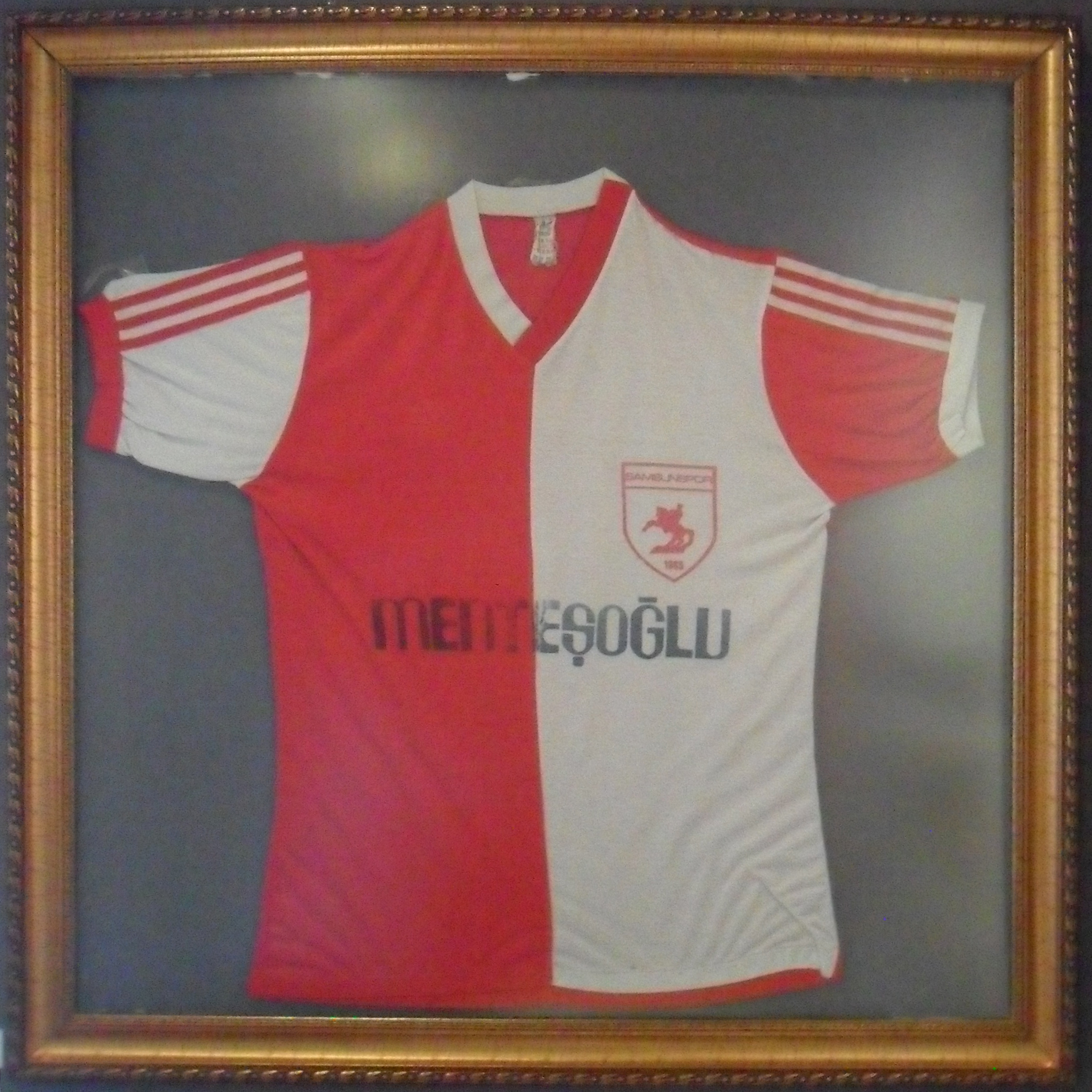 Samsun Kent Müzesi'nde sergilenen Muzaffer Badalıoğlu'nun forması. Badalıoğlu bu formayı 20 Ocak Faciası gerçekleşmeden önceki maçta son kez giymiştir.